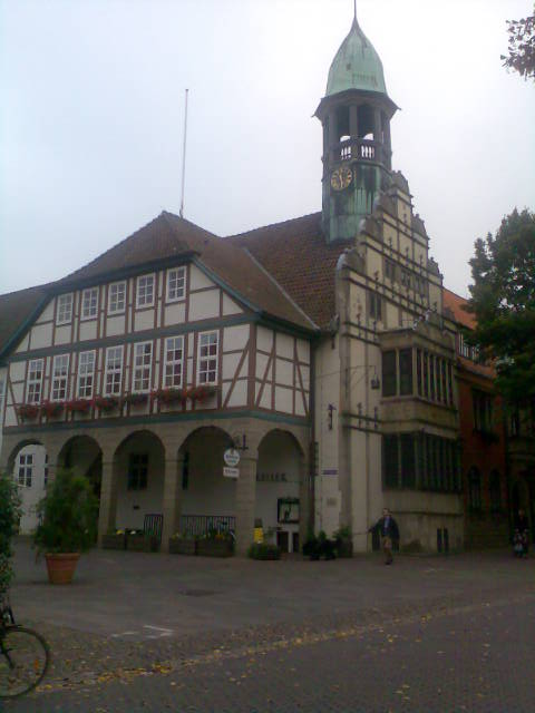 Altes Rathaus Von Nienburg an der Weser (mit Kuppel)